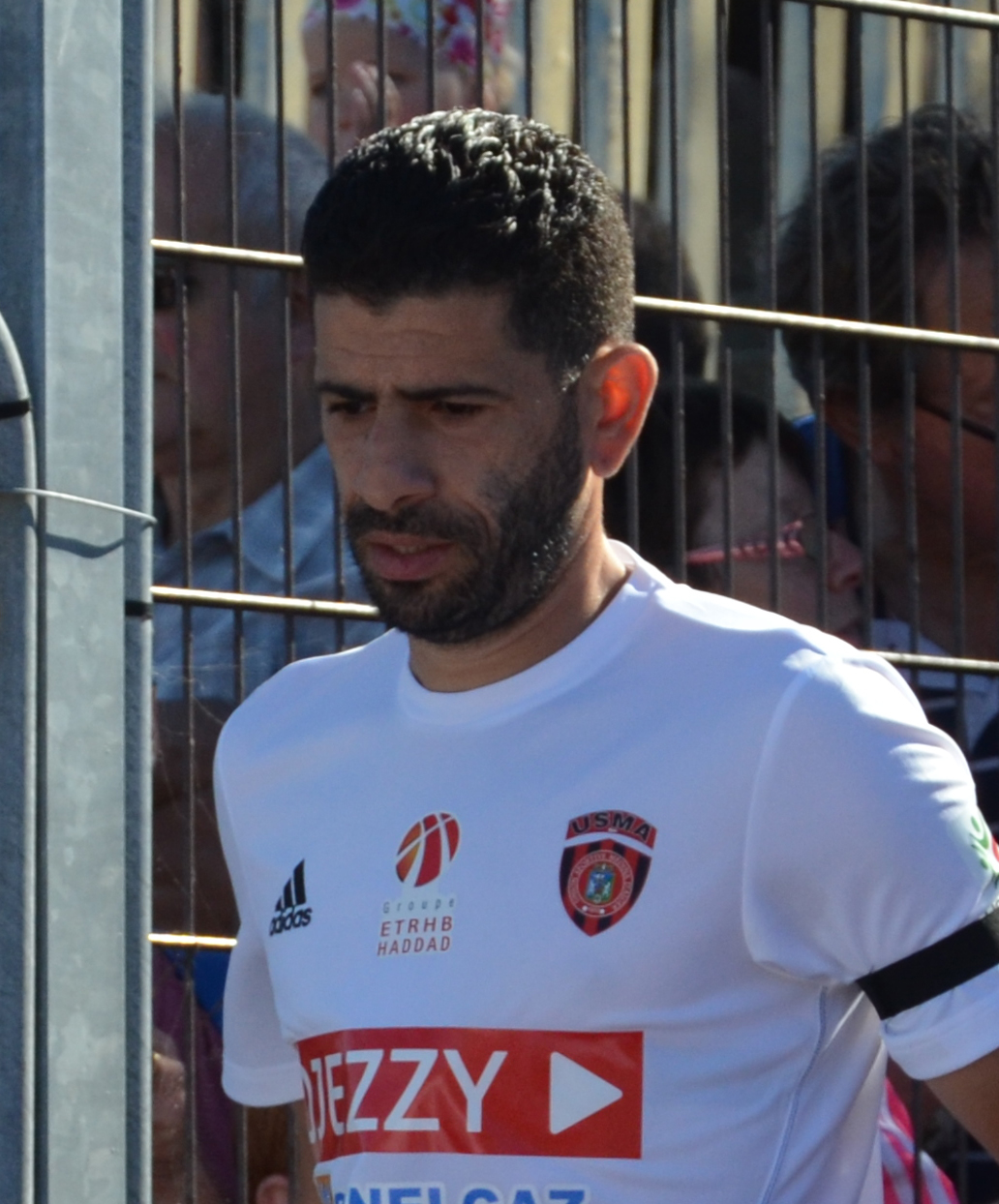 Photographie prise lors du match opposant le Stade rennais à l'USM Alger en match amical au stade Paul-Audrin de Dinard le 16 juillet 2016. Ici, Mohamed Meftah.